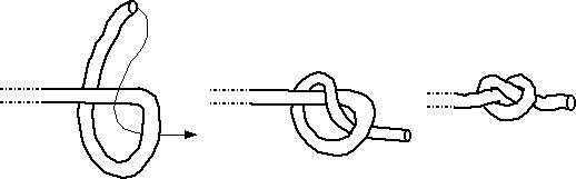 Demi-nœud d'arrêt.